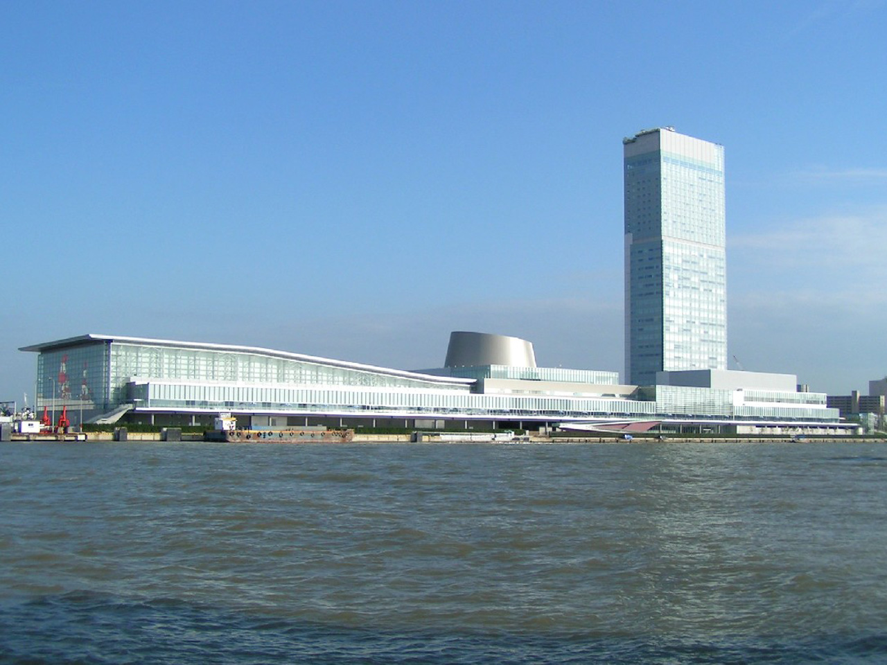 新潟島より信濃川を挟んで撮影